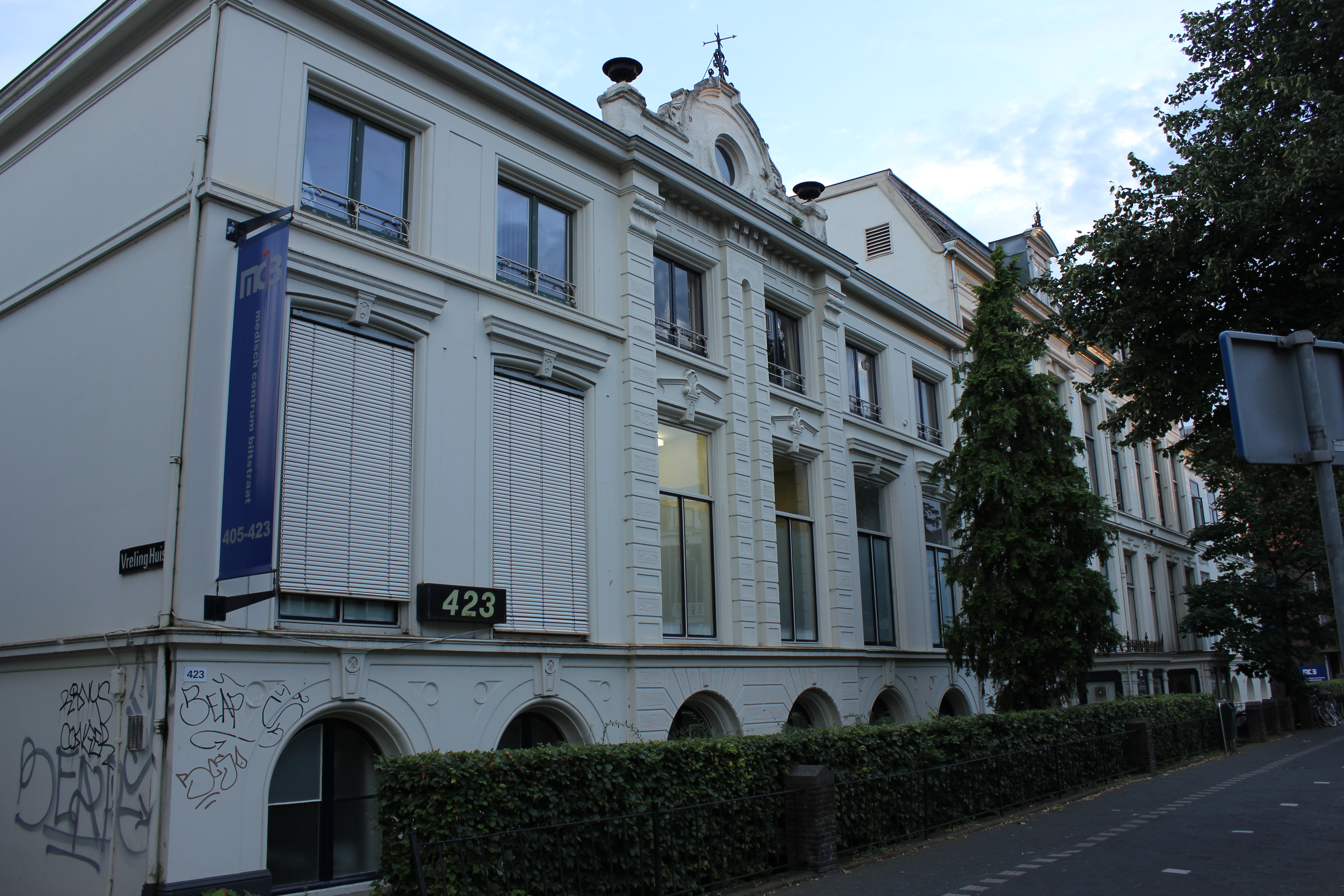 Rijksmonument Biltstraat 423 in Utrecht. In dit pand is het Vrelinghuis gevestigd, een abortuskliniek. 3″ N, 5° 08′ 06.11″ E